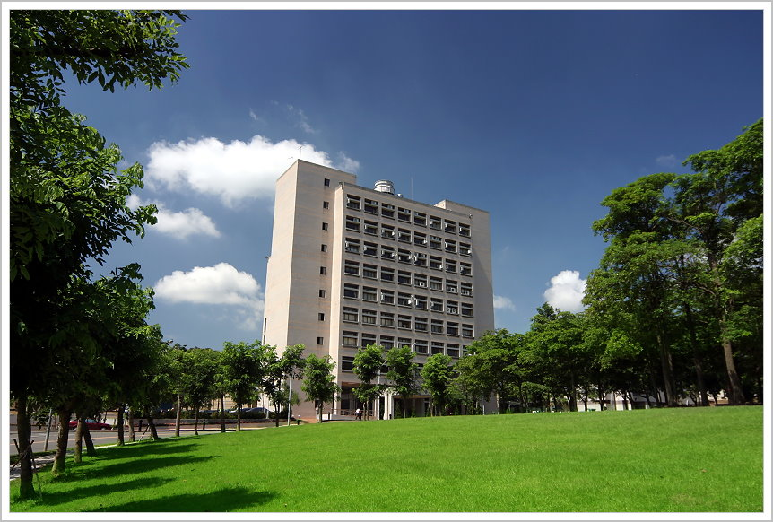 國立彰化師範大學寶山校區經世館